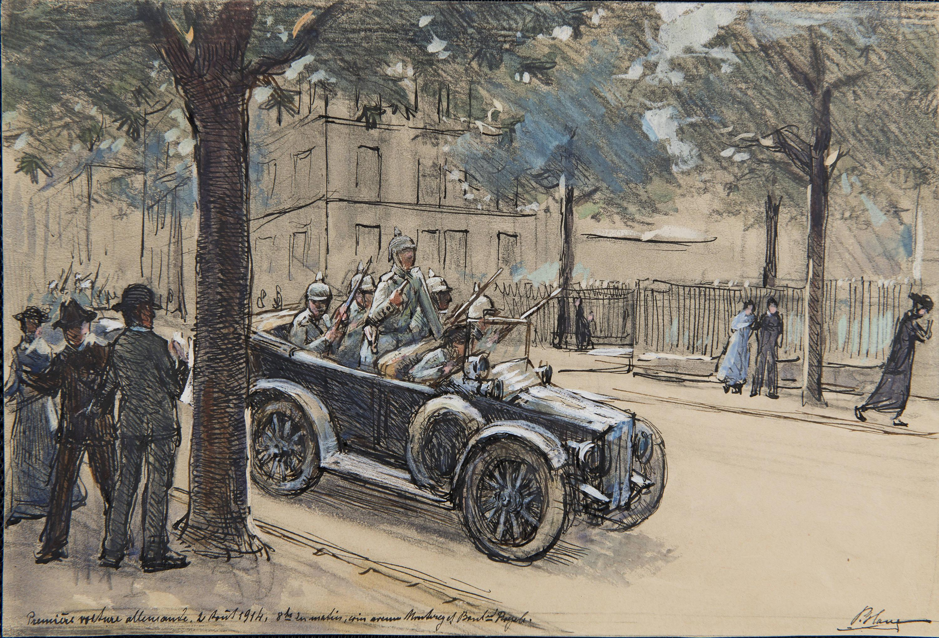 Pierre Blanc: Première voiture allemande. 2 août 1914, 8hrs du matin, coin Avenue Monterey et Boulevard Royal.